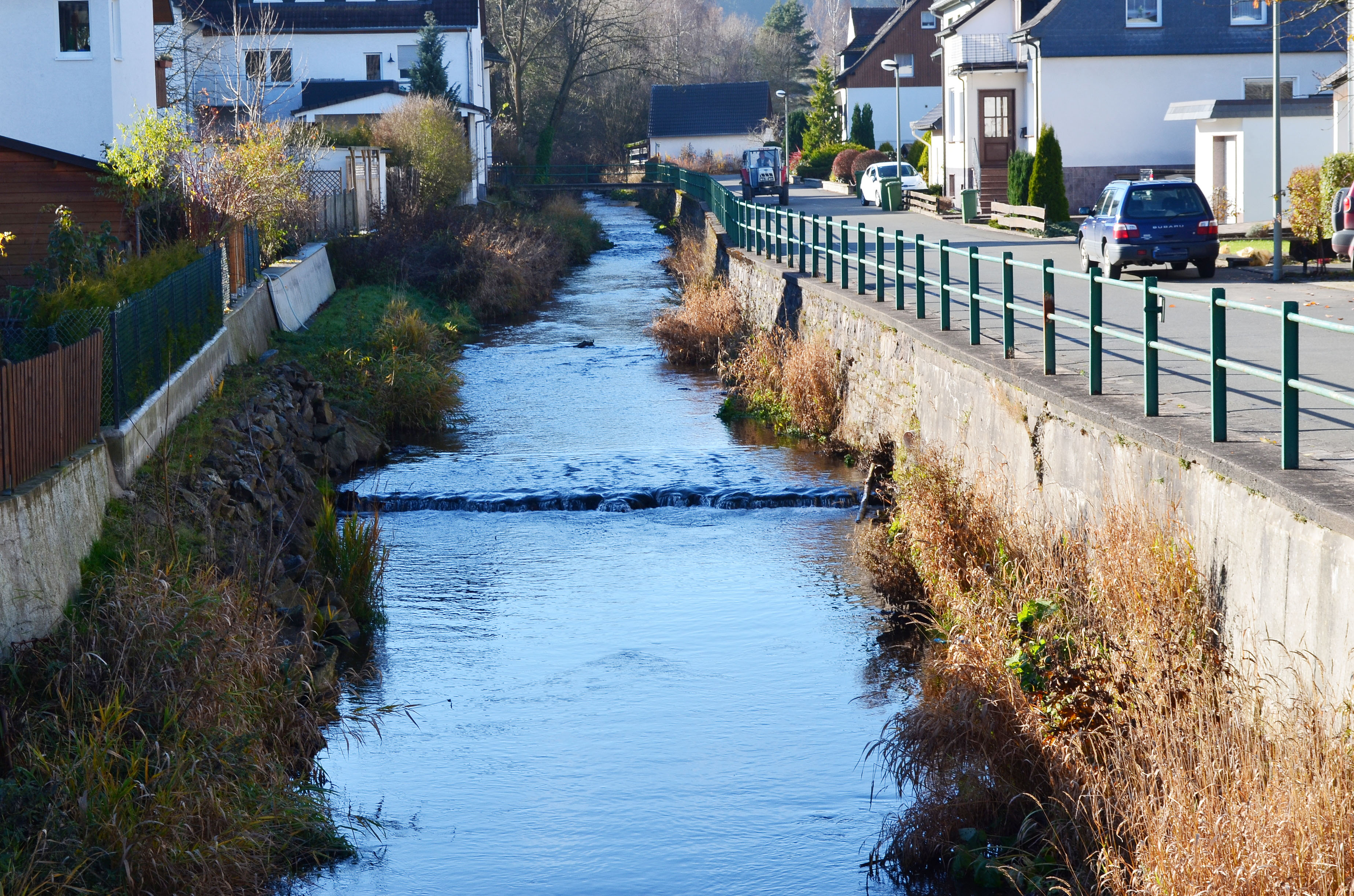 Brilon, Hoppecke, die Hoppecke